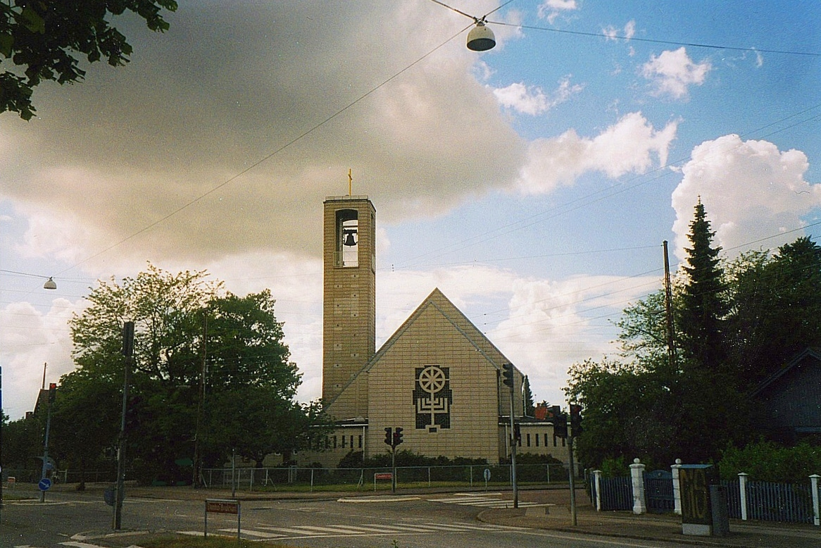 Hendriksholm, Hendriksholm Sogn, Rødovre Kommune